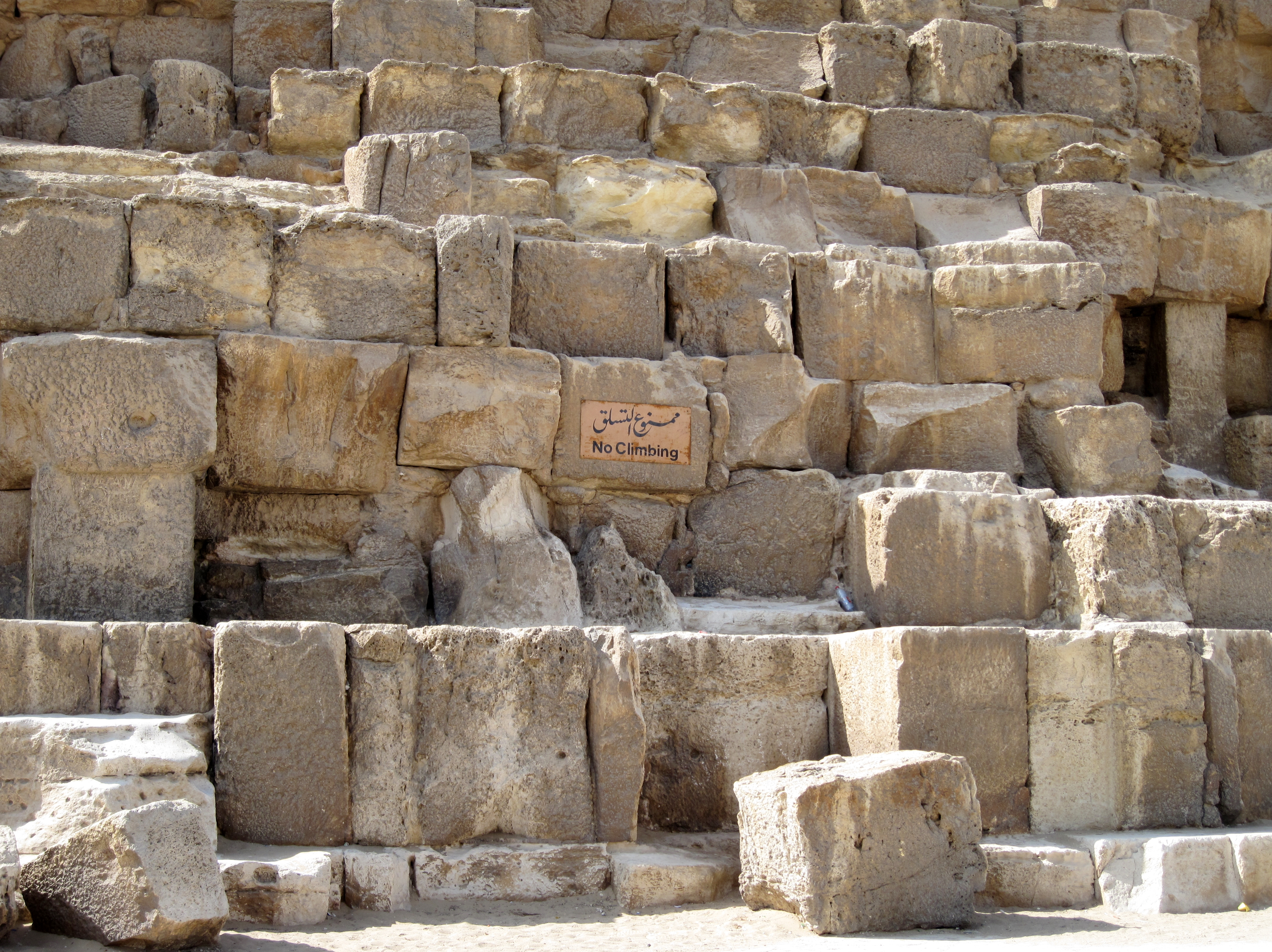 Detail der Nordseite der Cheops-Pyramide auf dem Giseh-Plateau bei Kairo, Ägypten